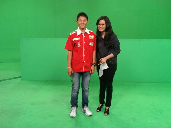 Rio Haryanto bersama Widya Saputra